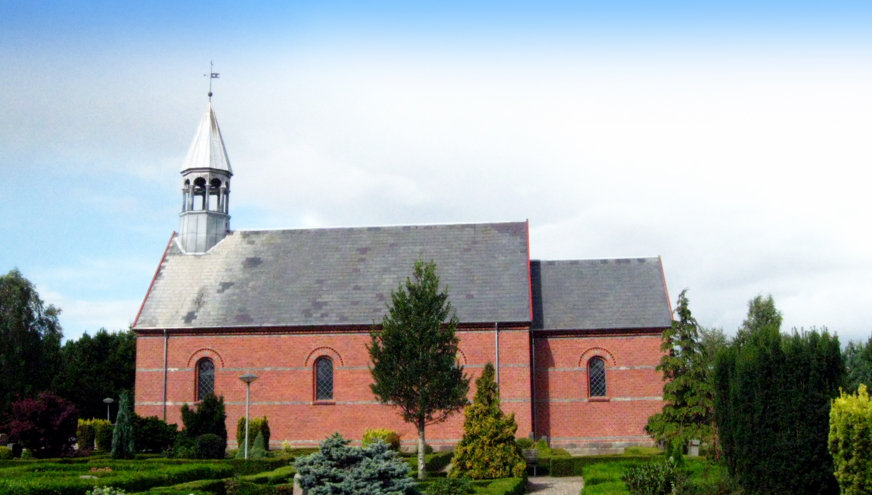 Jerup Kirke, Frederikshavn Kommune, 2009